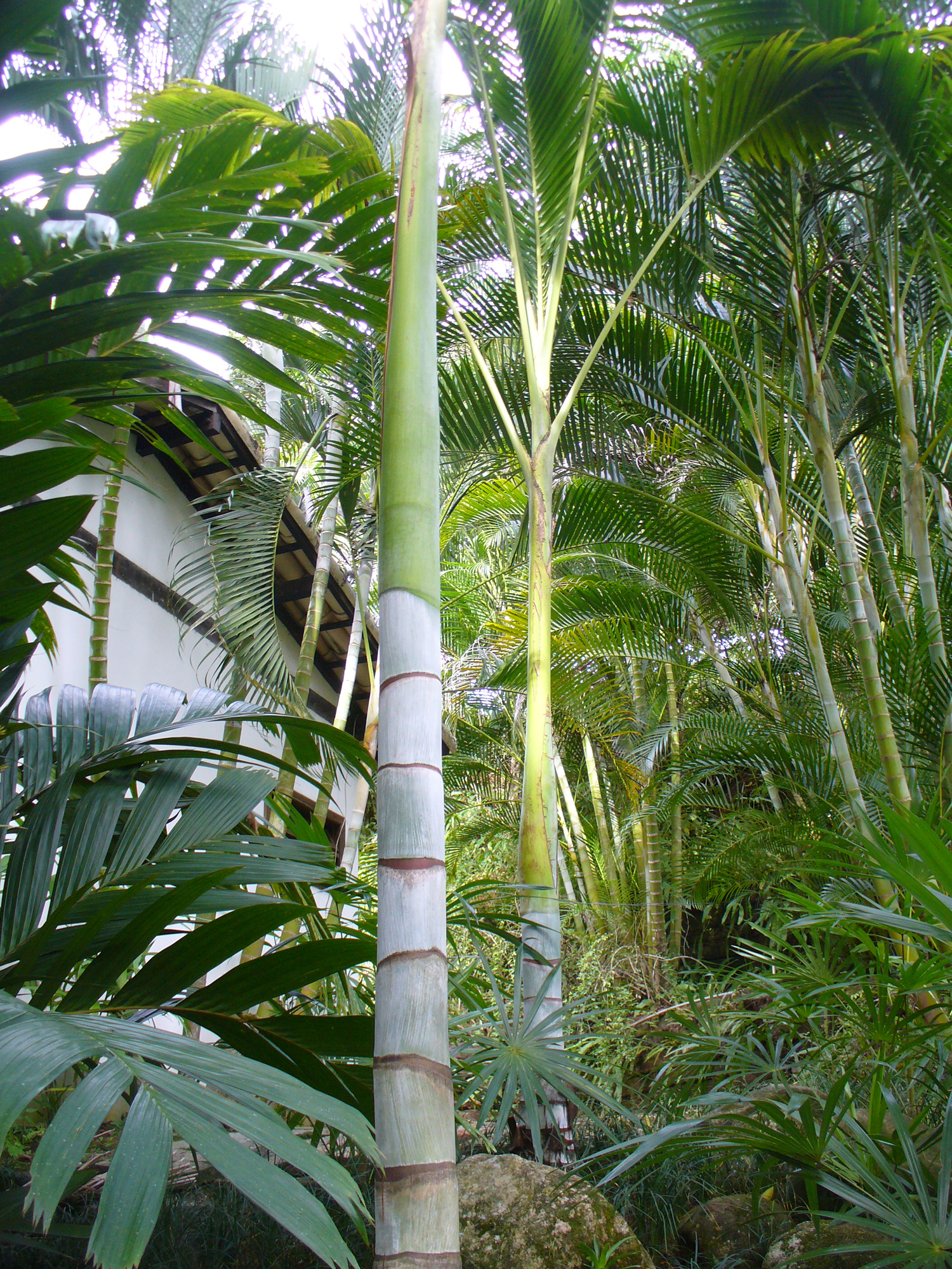 Clinostigma harlandii,cultivated, Boa Esperanza ranch, Brazil.